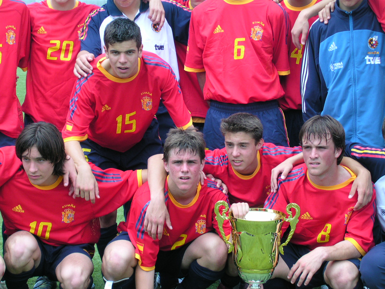 España Campeón del Torneo participan ademas Canarias e Irlanda